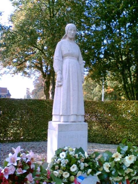 Razziamonument in Putten (Gelderland)/The Netherlands - zelf gemaakte foto door gebruiker Eve